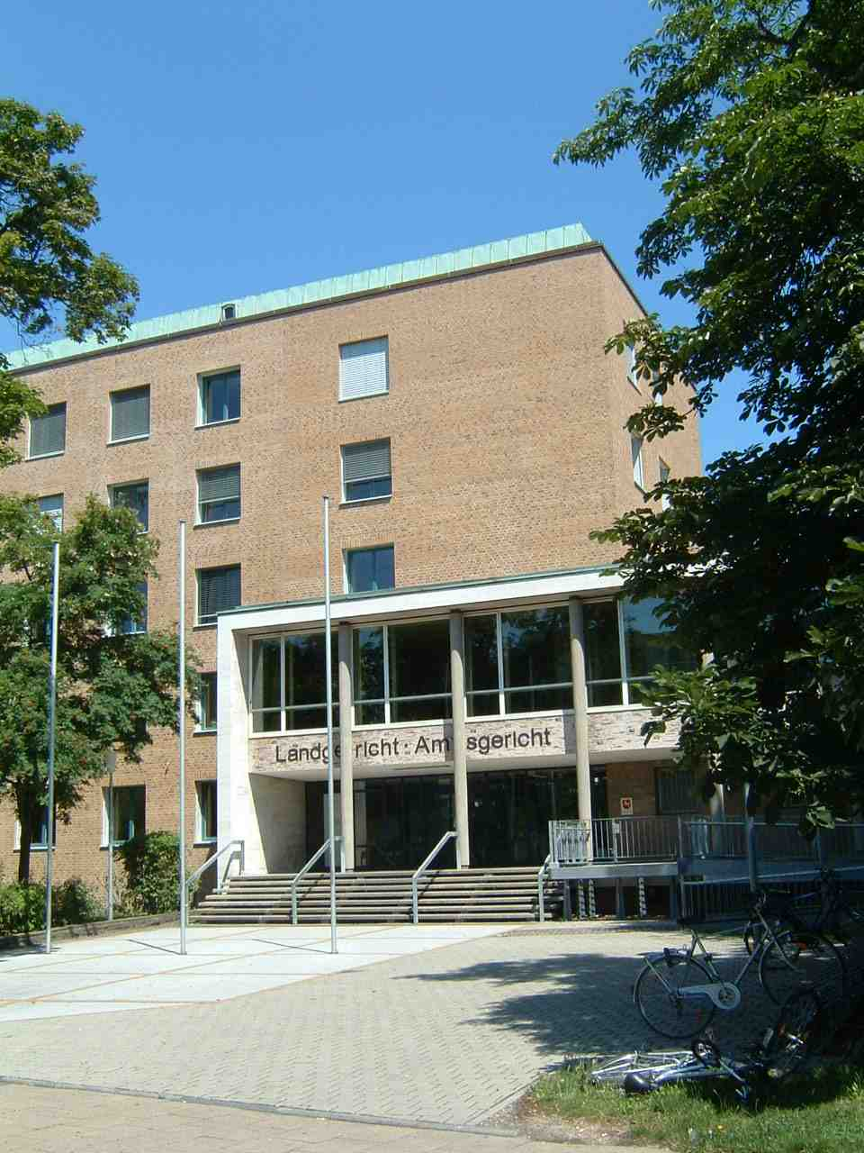 Landgericht Göttingen, am 10.07.2005 um ca. 13.15 Uhr aus Sicht der Godehardstr./Ecke Berliner Str. fotografiert